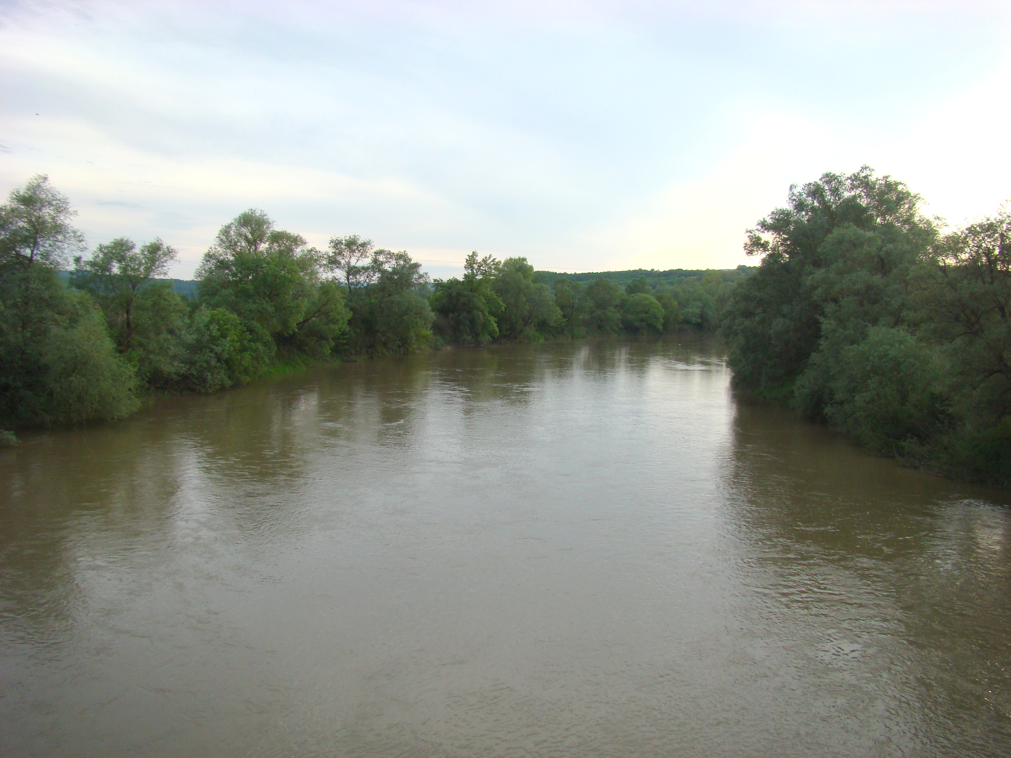 Râul Someş la Letca în judeţul Sălaj